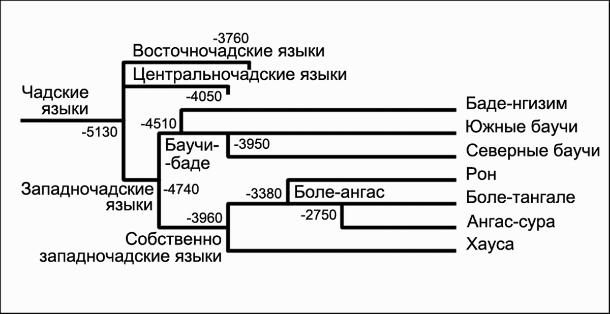 Схема западночадской языковой ветви по времени расхождения её подветвей, групп и подгрупп. Источники: Václav Blažek. Afro-Asiatic linguistic migrations: linguistic evidence. — Masarykova univerzita. Filozofická fakulta. — S. 7—8.